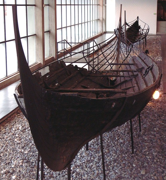 Skuldelev III: Ein wikingerzeitliches Fracht- und Reiseschiff, das im Roskilde-Fjord in der Nähe von Skuldelev gefunden wurde.